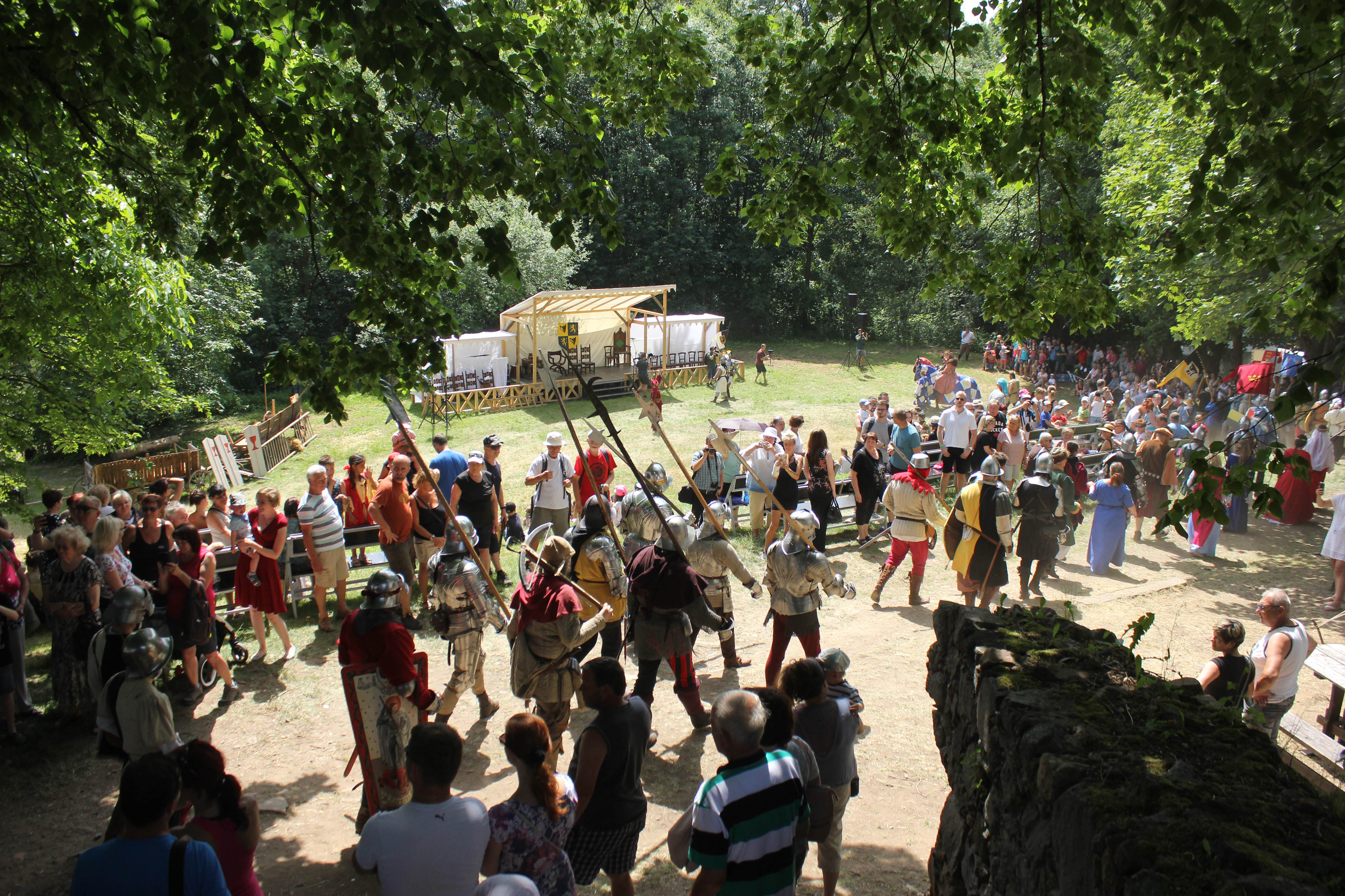 Slavnost Johanky z Rožmitálu 2019